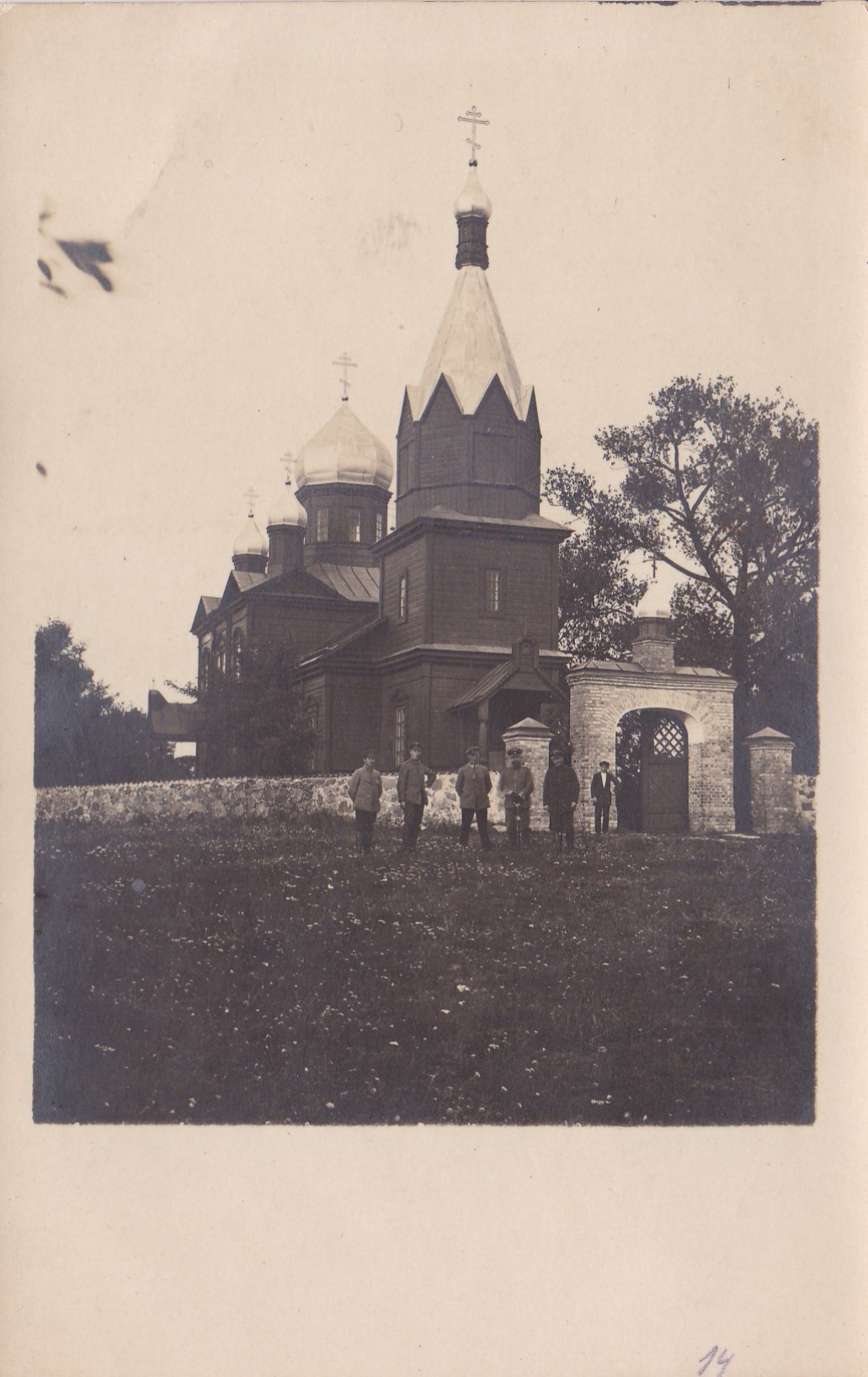 Беларуская (тарашкевіца): Кузьніца (Kuźnica). Царква-мураўёўка ў імя Аляксандра Неўскага